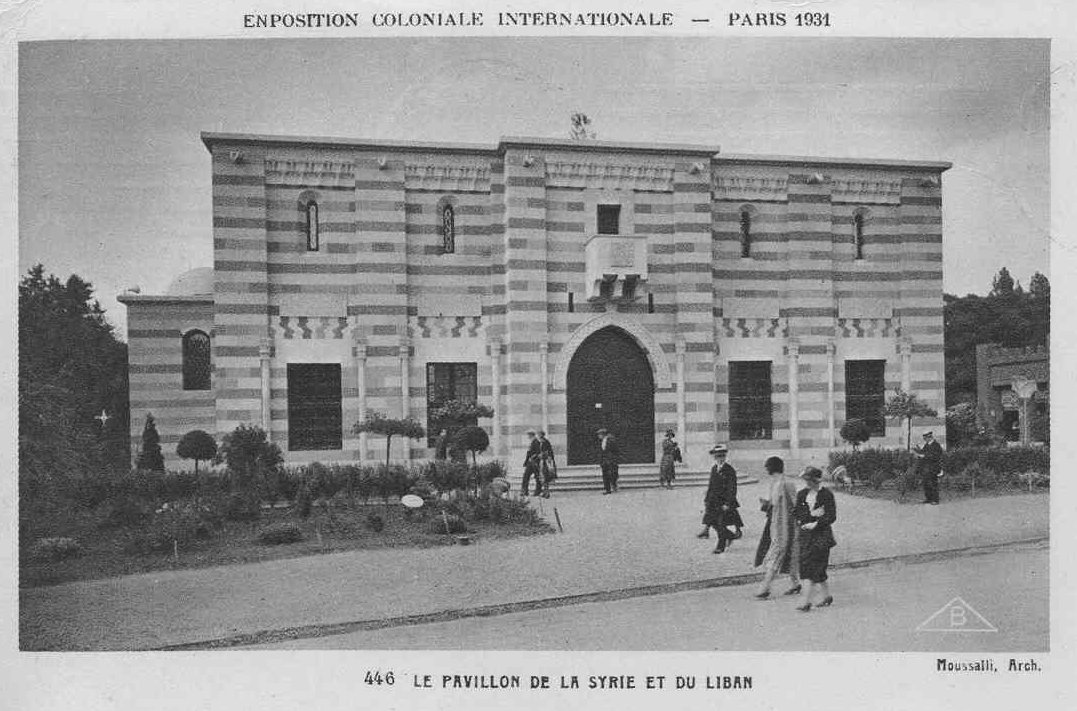 Pavillon des Etats du Levant à l'Exposition Coloniale de PARIS en 1931